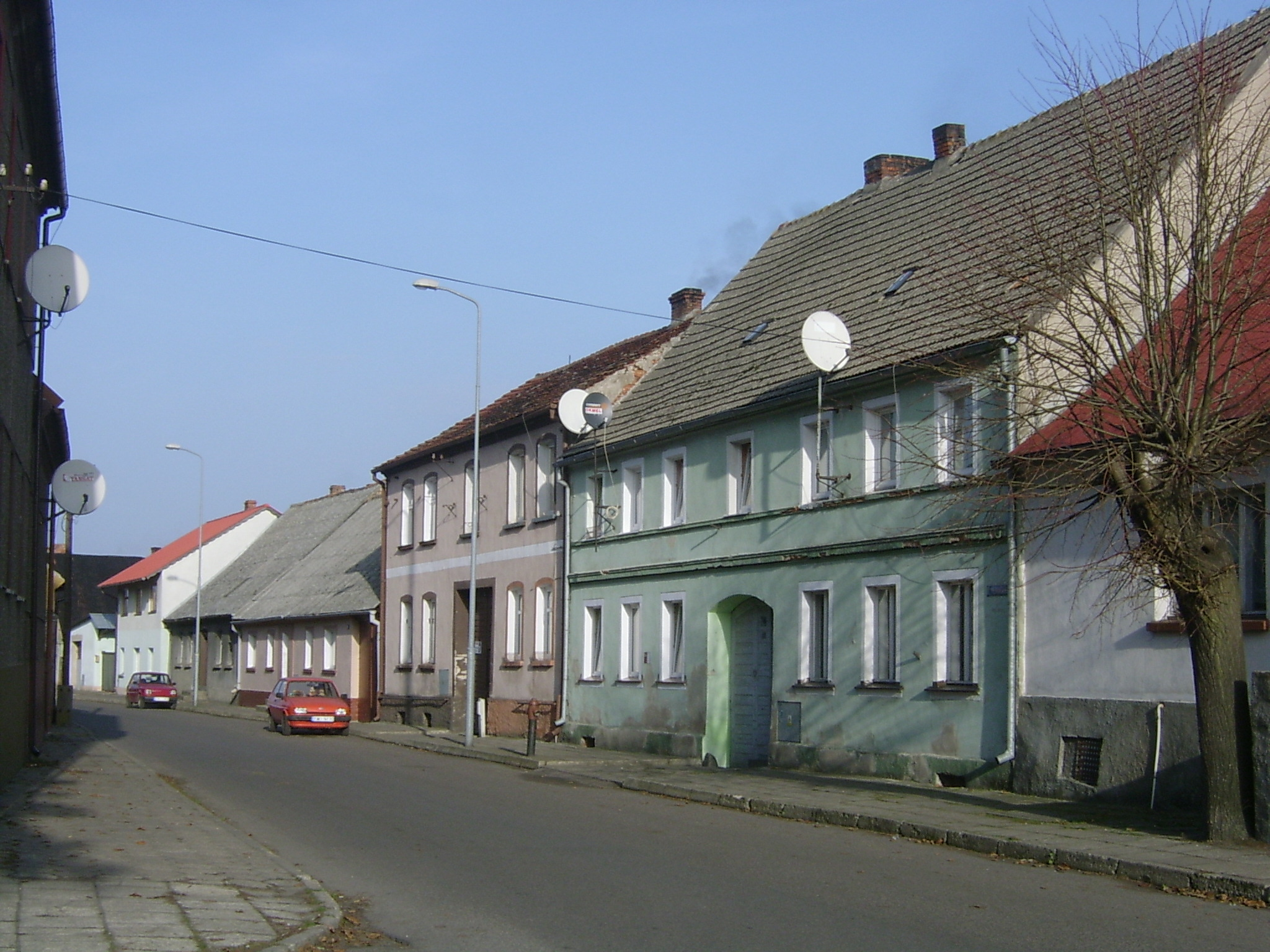 Brójce (gm. Trzciel, woj. lubuskie, Poland}